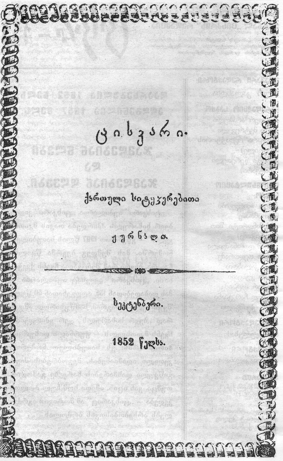 ჟურნალ ცისკარის 1852 წლის გამოცემის გარეყდა